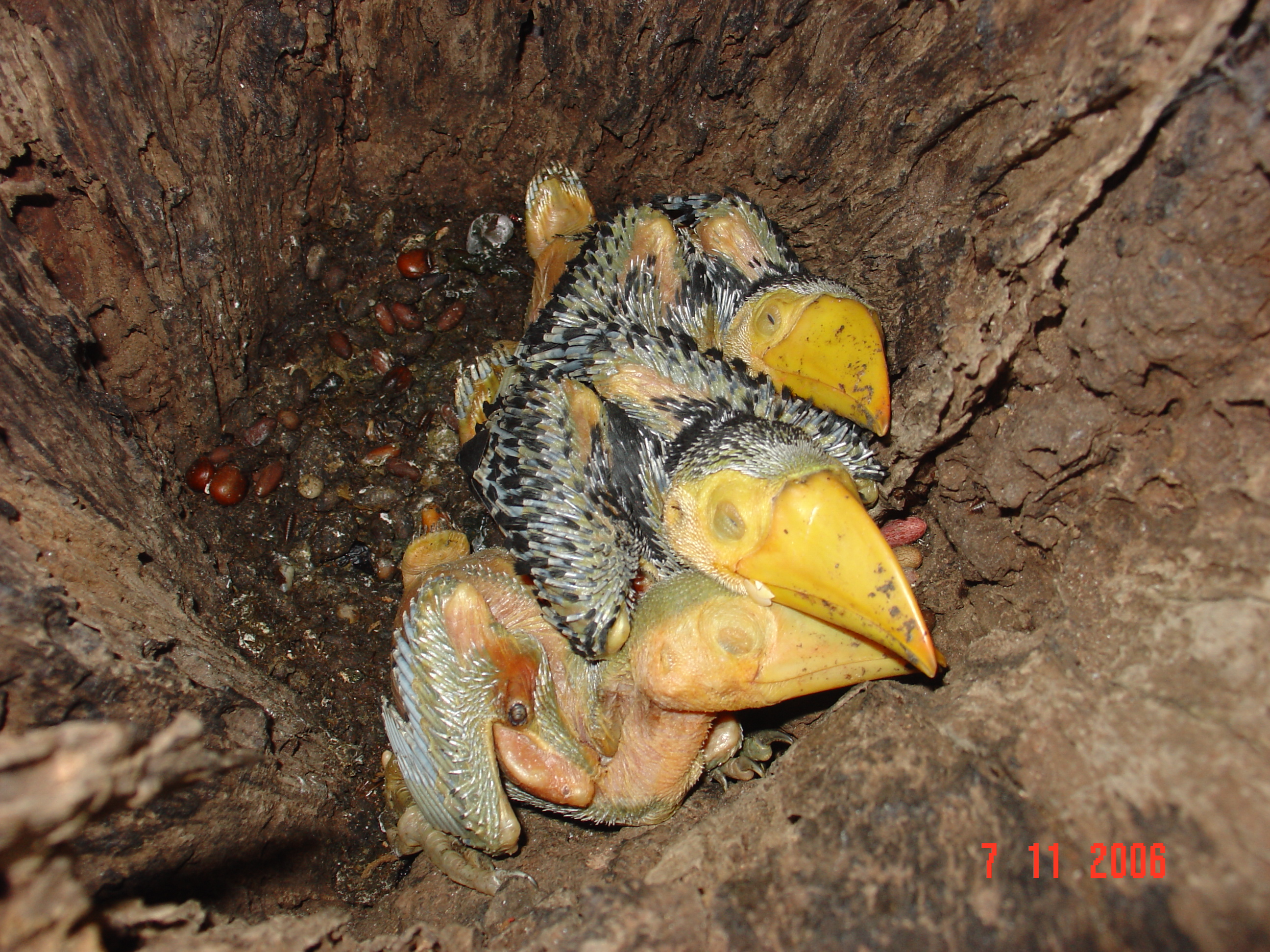 Ninho de Tucano, ave típica do cerrado brasileiro.